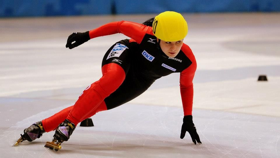 Bianca Walter, EnergieverbundArena Dresden 2012